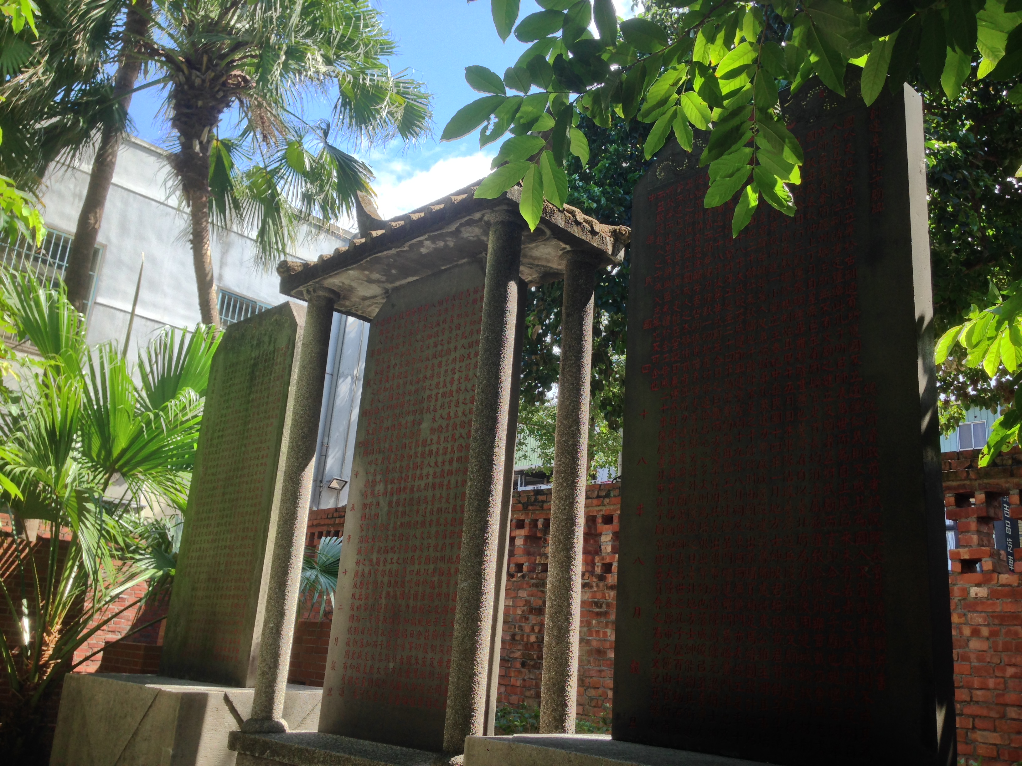 中文（台灣）: 台北孔子廟石碑